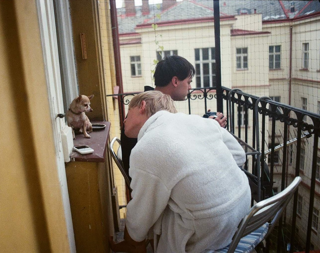 I Like You Hysteric